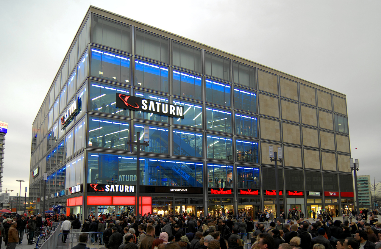 Alexanderplatz Berlin: Das Handelshaus die mitte eröffnet am 25. März 2009.